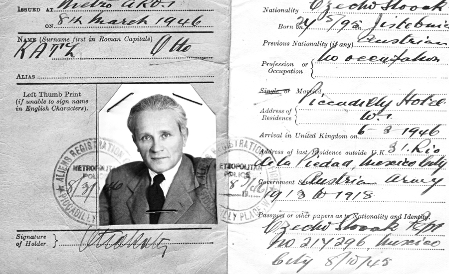 Certifikát na jméno Otto Katz opravňující svého majitele k dočasnému pobytu ve Velké Británii při návratu do vlasti v r. 1946. Tento doklad ilustruje pestrost jeho identit.